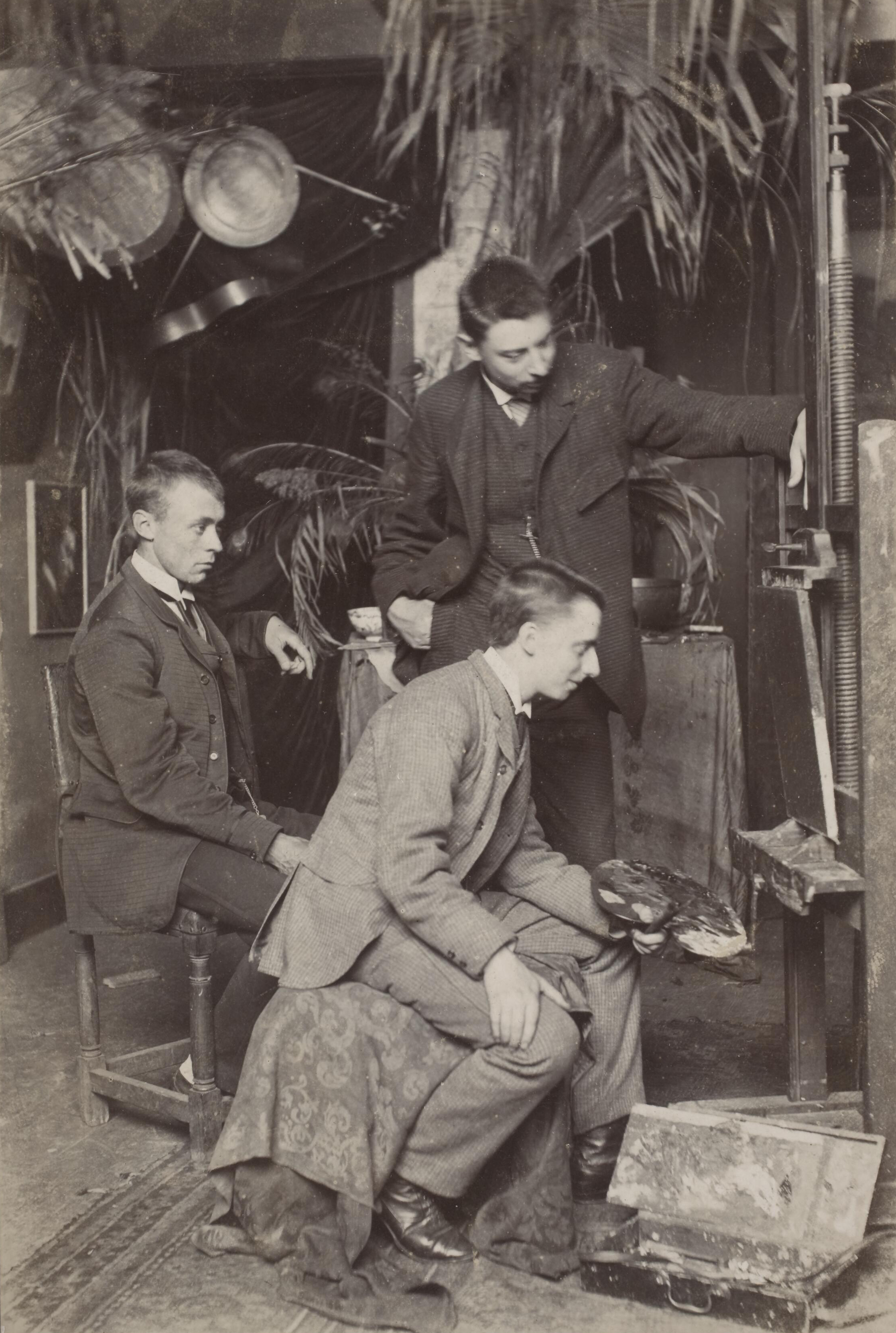 Pieter Cornelis de Moor (zittend links), Simon Moulijn (met palet) en Derk Wiggers (staand)